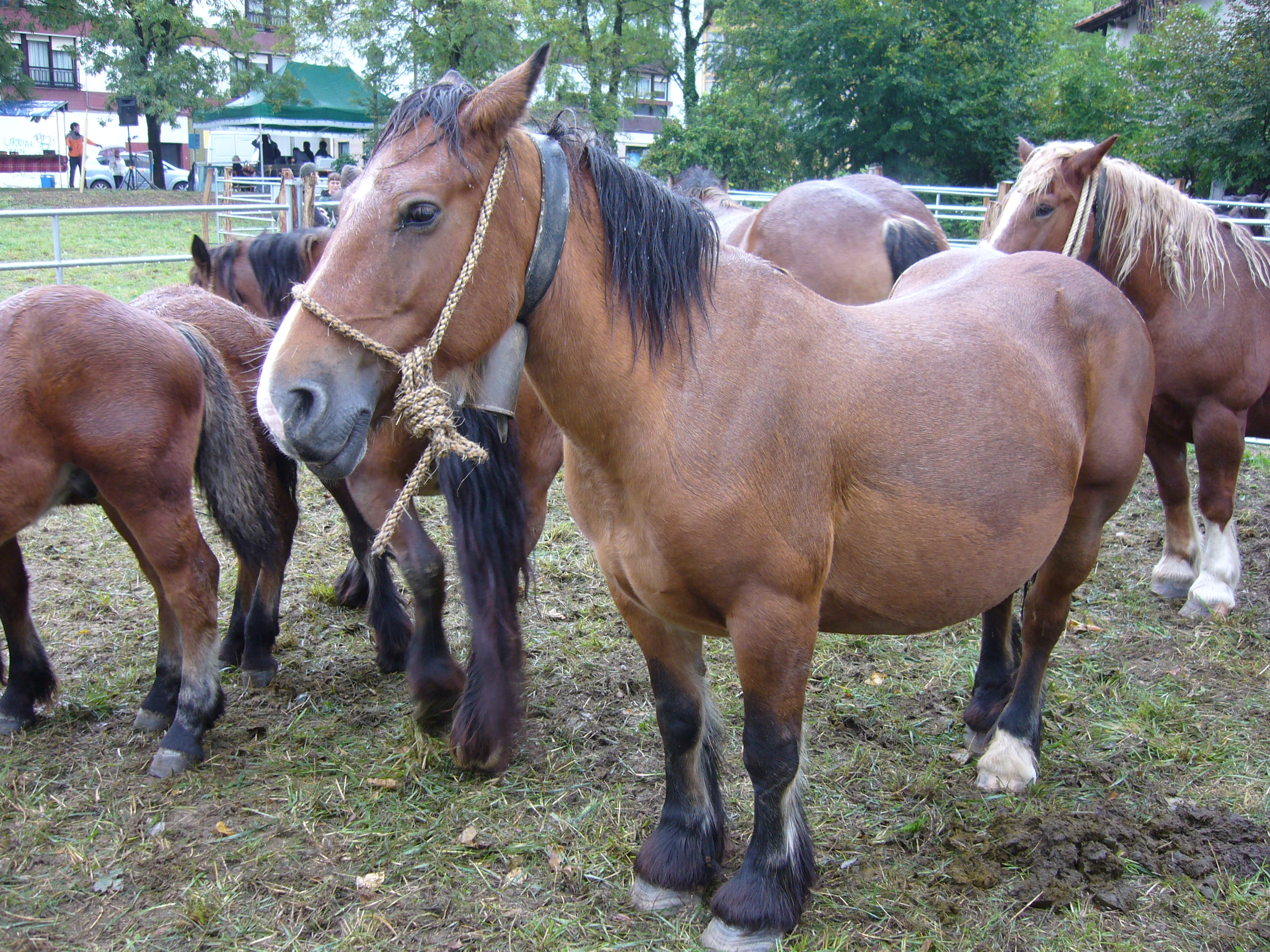 Euskal Herriko mendiko zaldiak